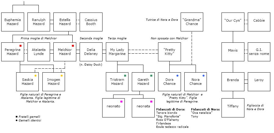 Albero genealogico dei personaggi del romanzo Figlie sagge di Angela Carter.